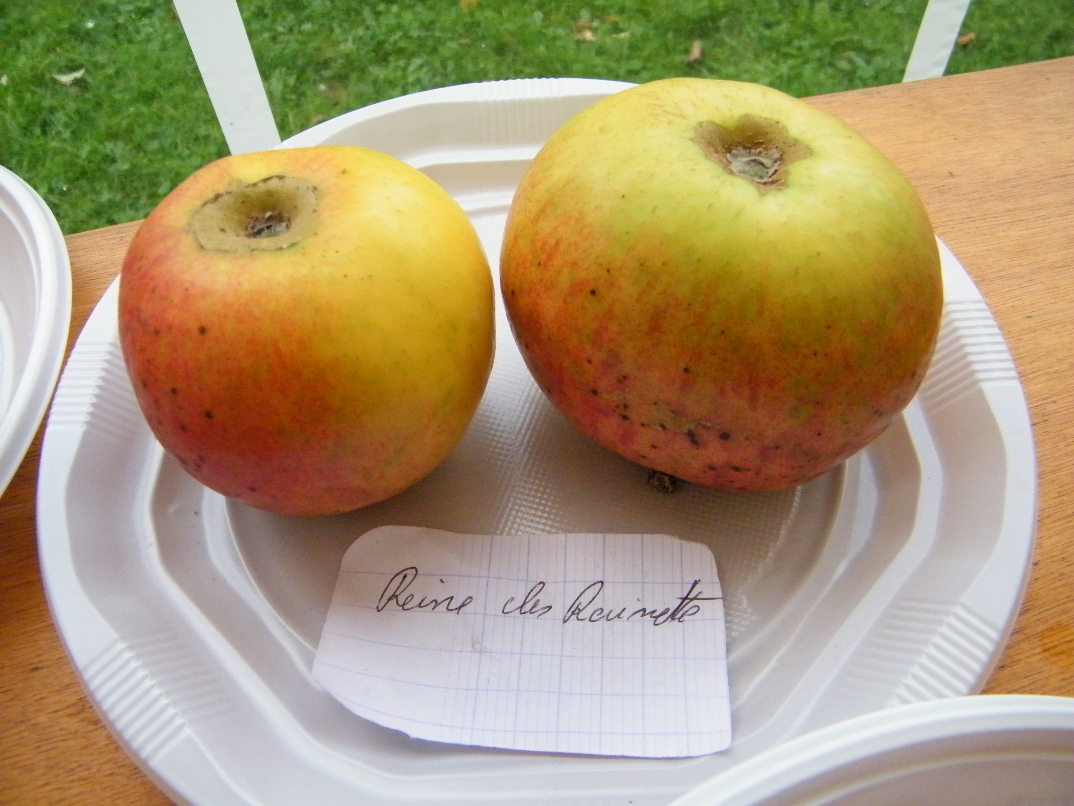 Reine des Reinettes, Mons-Boubert, Somme, Fr, expo du 29-10-2017 (33)